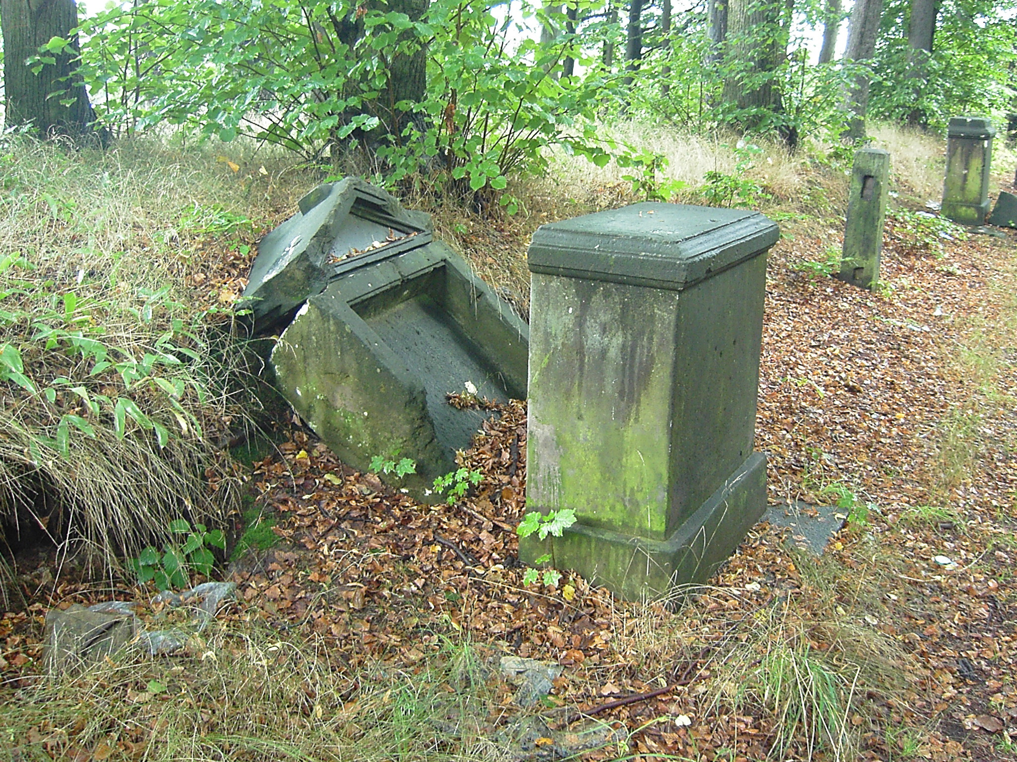 Křížová cesta v Krásné Lípě